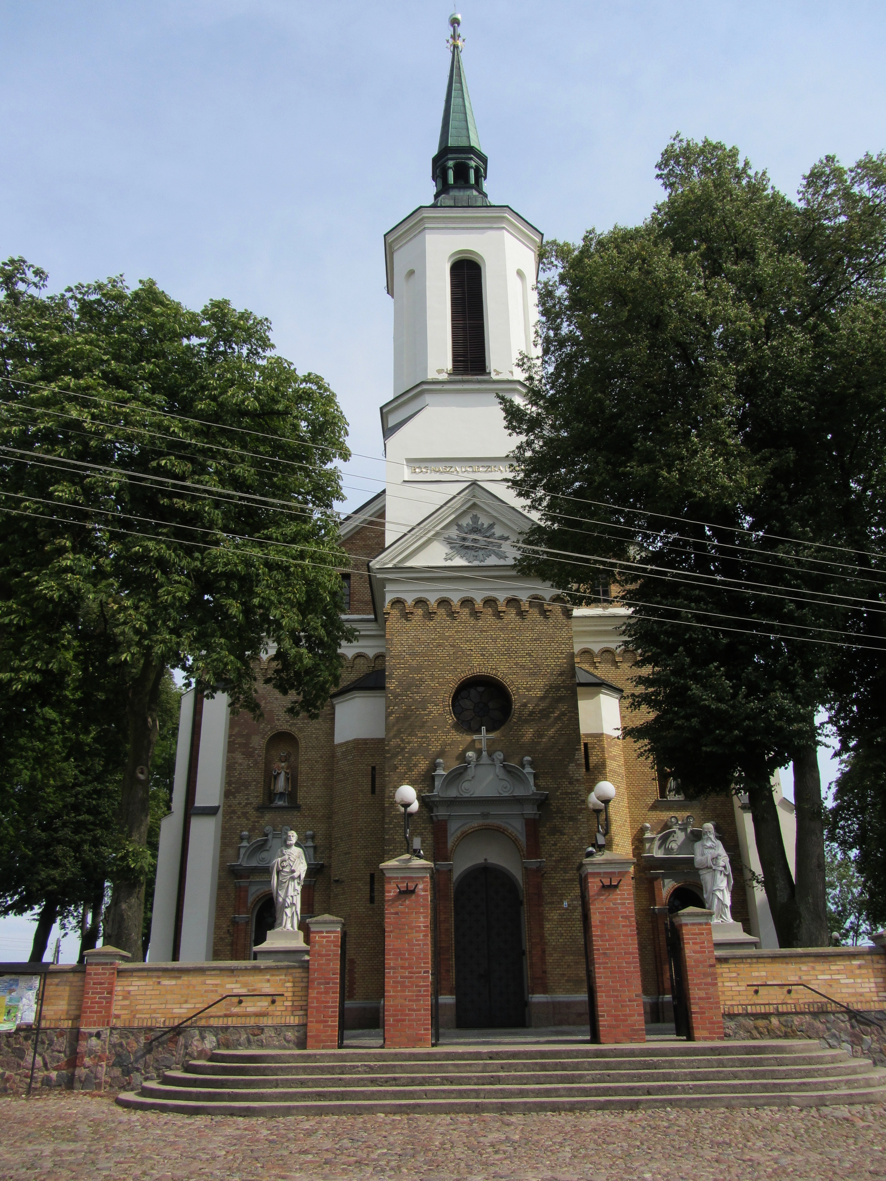 Dobrzyniewo Kościelne - kościół parafialny p.w. Zwiastowania NMP (zabytek nr 460 z 16.08.1979)